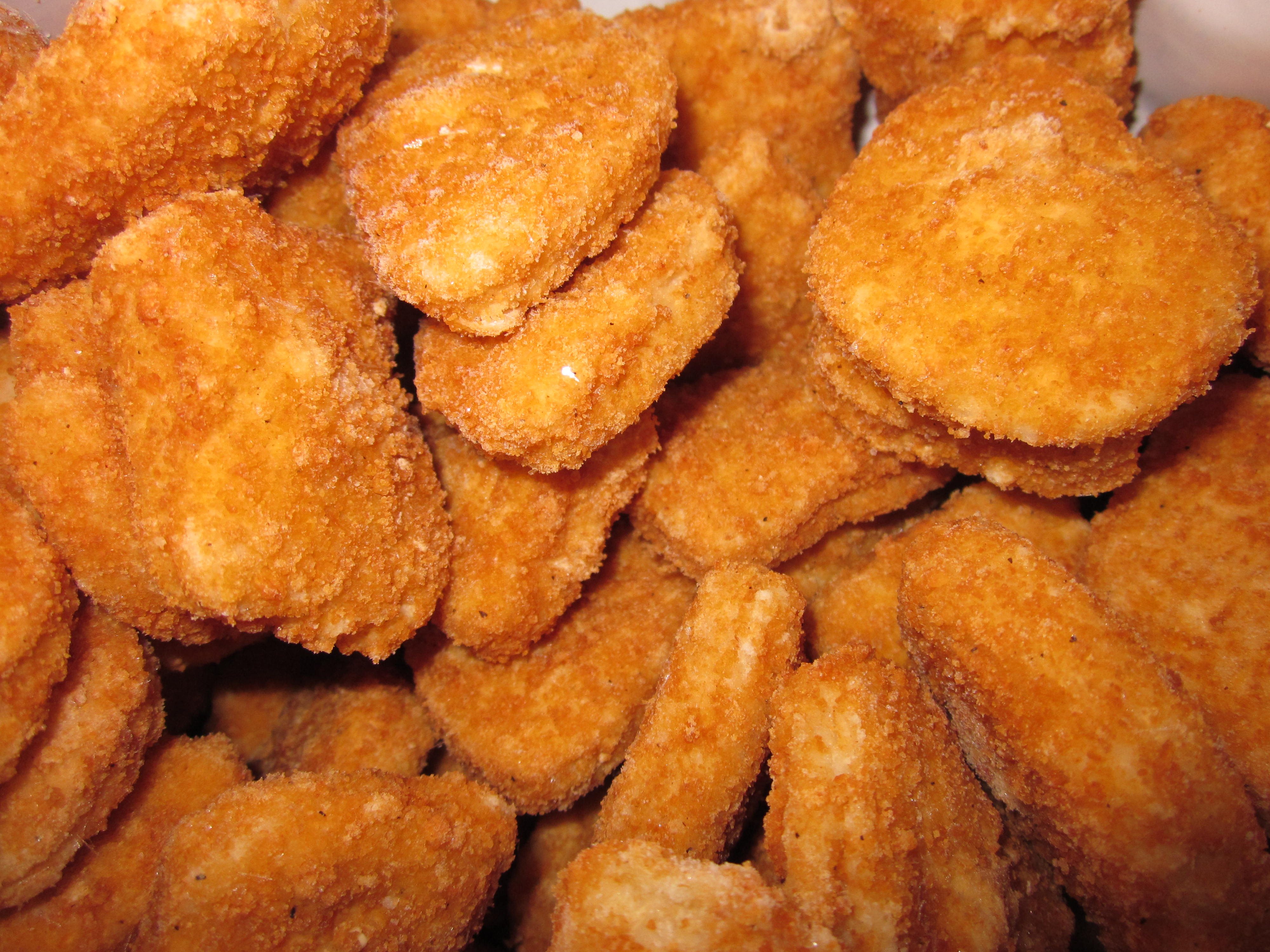 Frozen Foster Farms breast nuggets.